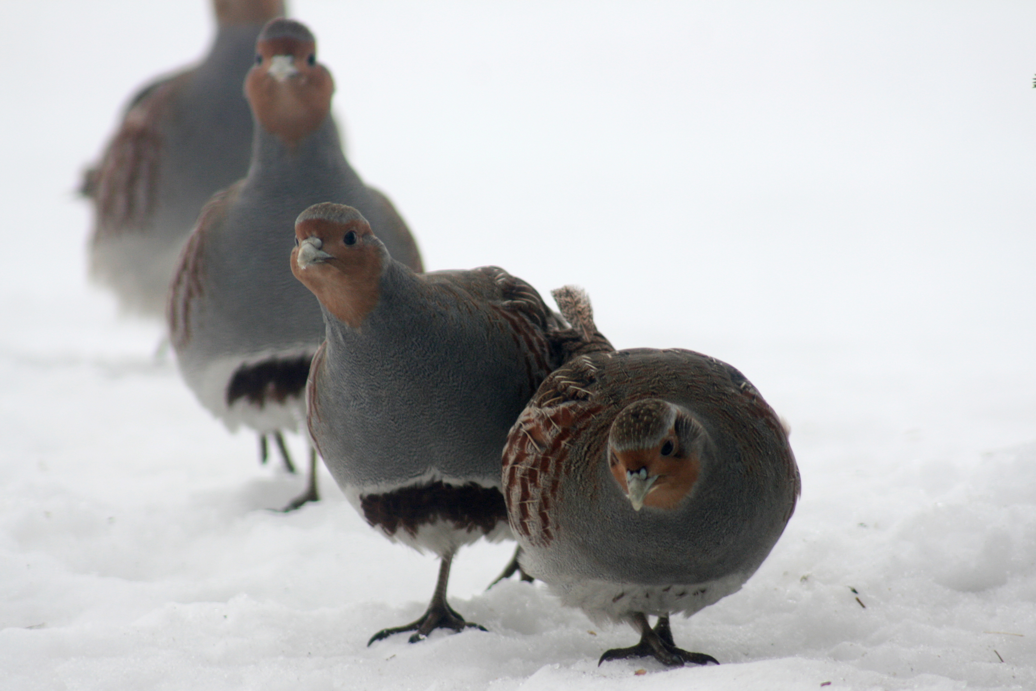 Perdix perdix